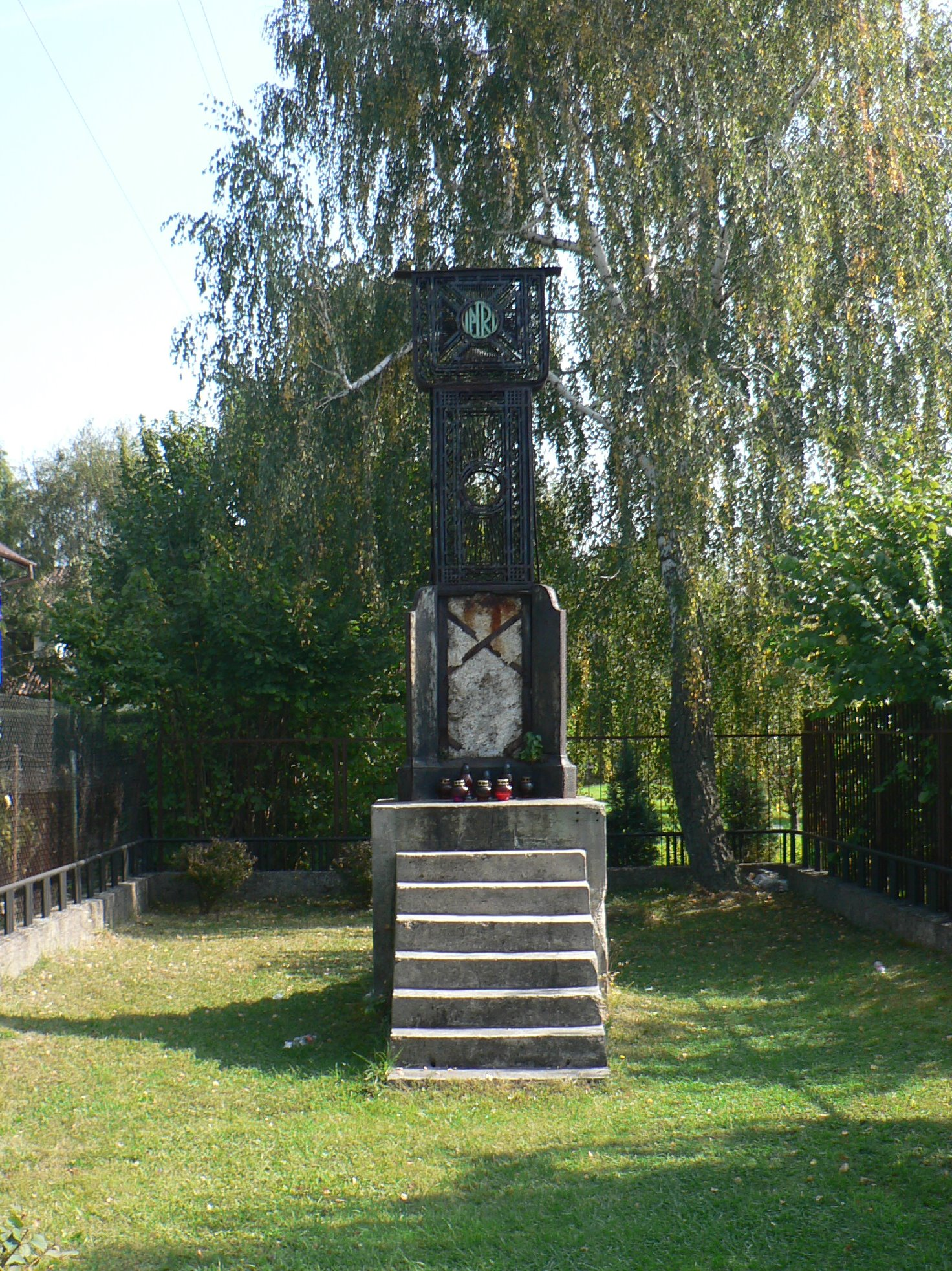 Pomnik w Michałowicach, wystawiony ofiarom katastrofy samolotu LWS.4A Żubr w 1936 r.